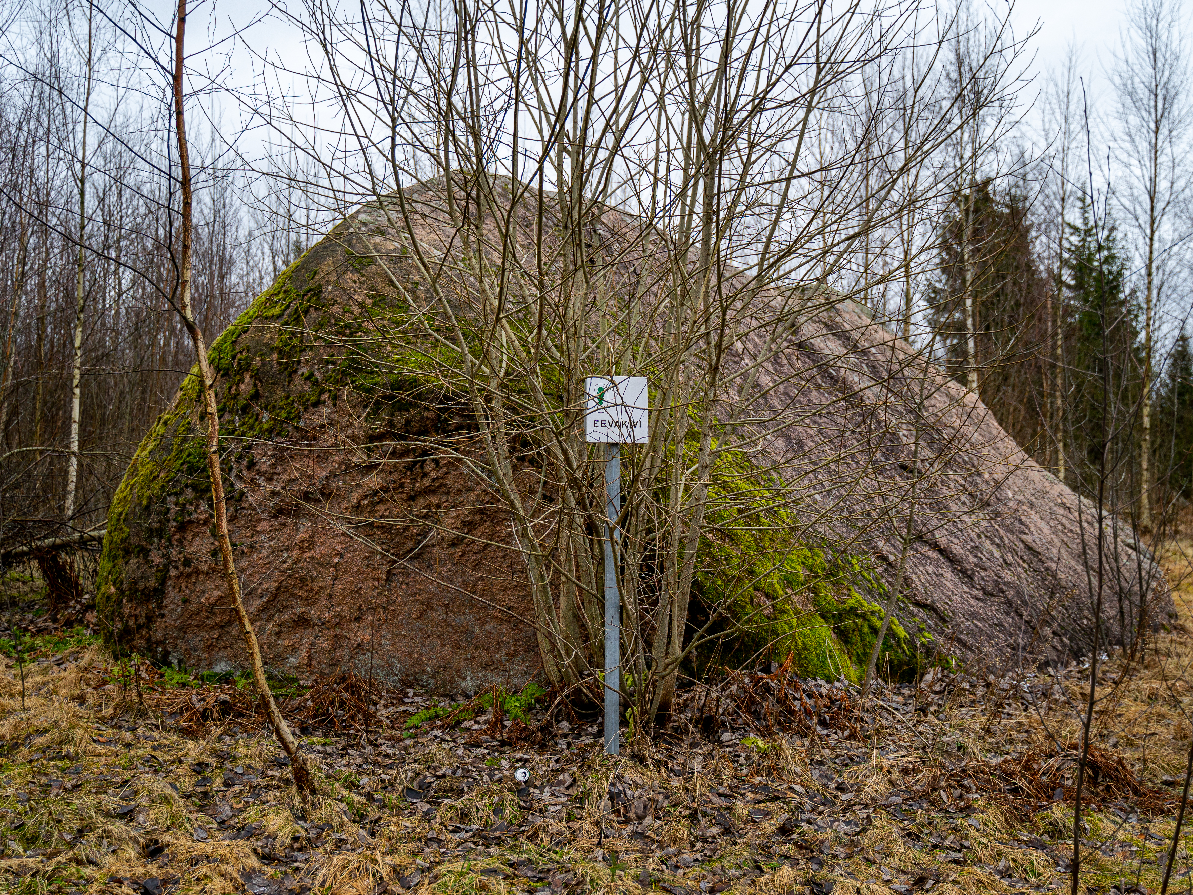 Eevakivi (ka: Pullevere kivi) on hiidrahn Järva maakonnas Järva vallas.